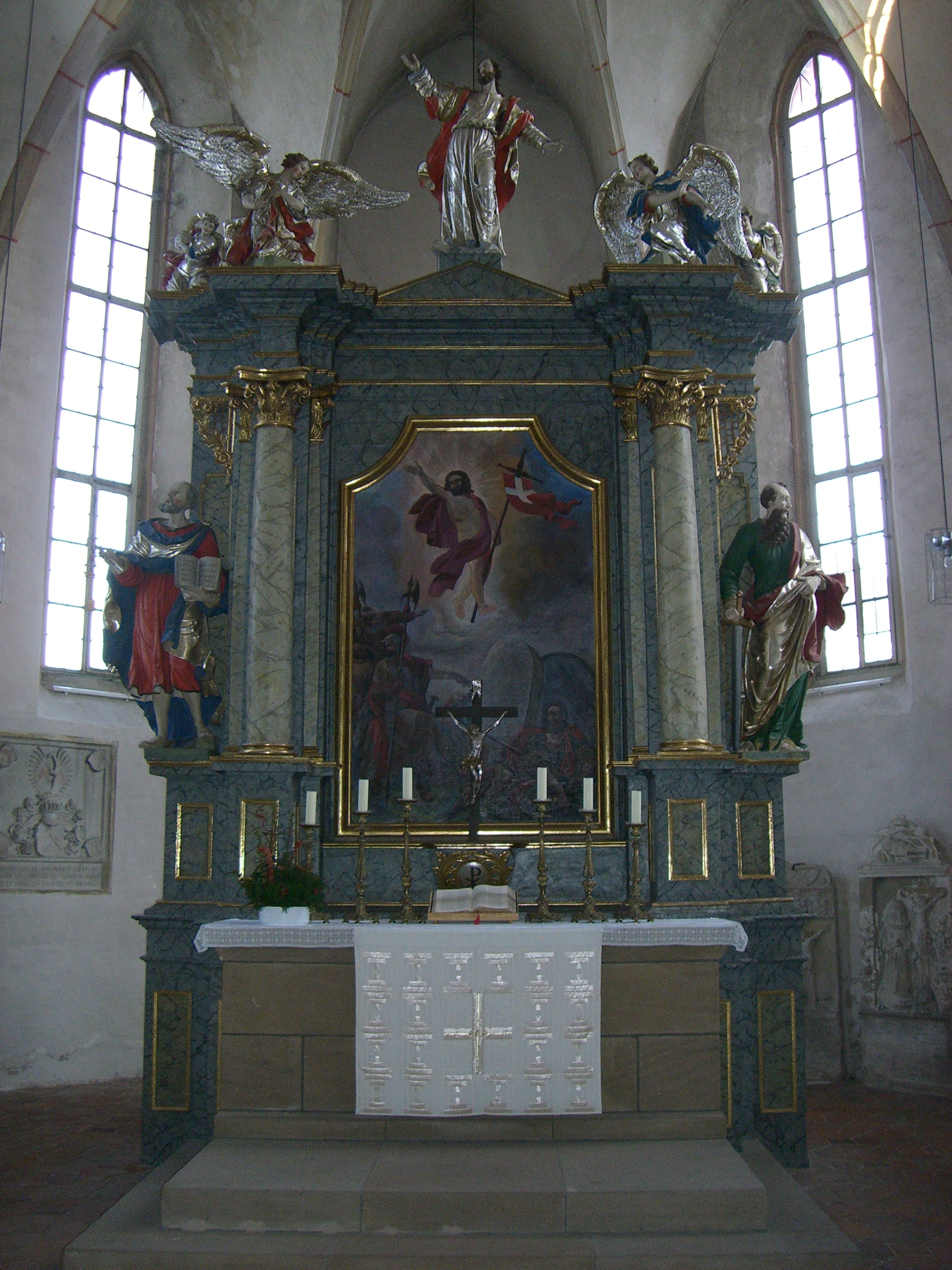 Altar der evang.-luth. Kirche St. Maria, Weißdorf